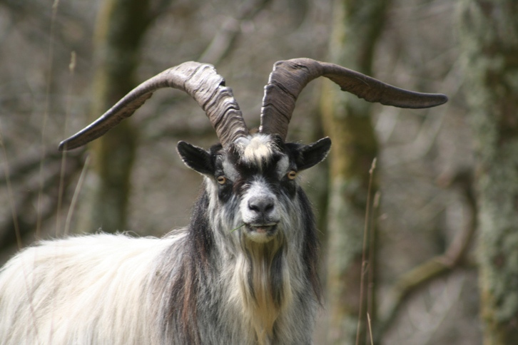 Feral goat